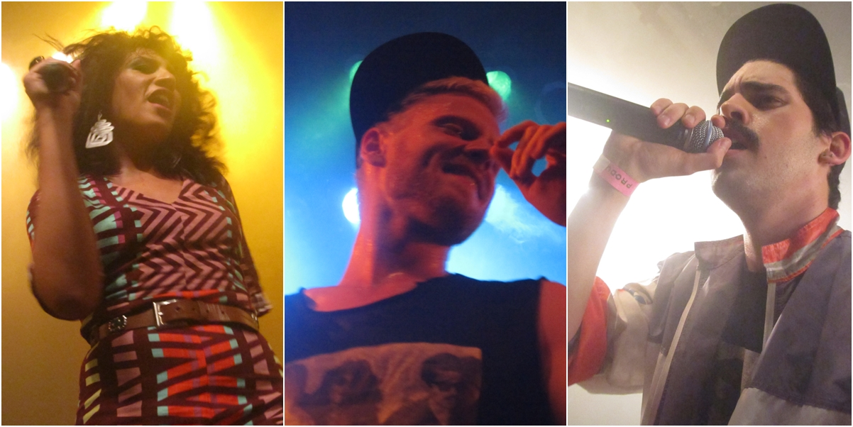 Banda Uó em apresentação.